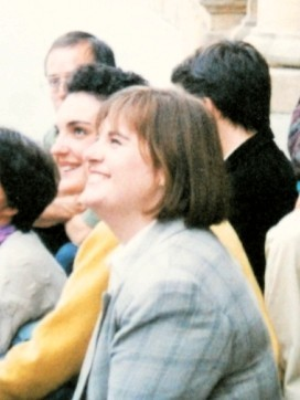 Miriam Urkia hizkuntzalaria Itziar Adurizekin Xuxen zuzentzailearen lehen bertsioa Koldo Mitxelena kulturunean 1993ko aurkepenean.